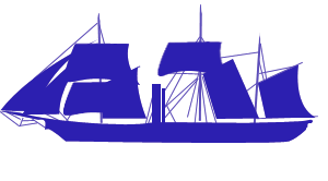 Transporte Lamar